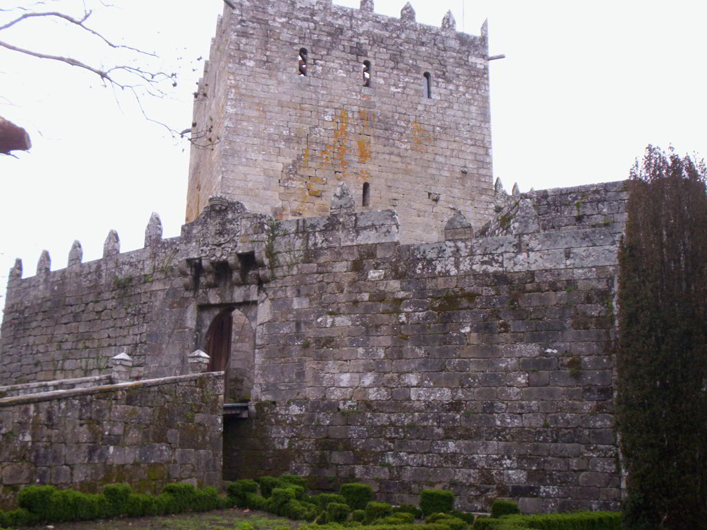 Torre da homenaxe do Castelo de Soutomaior - Soutomaior - Pontevedra